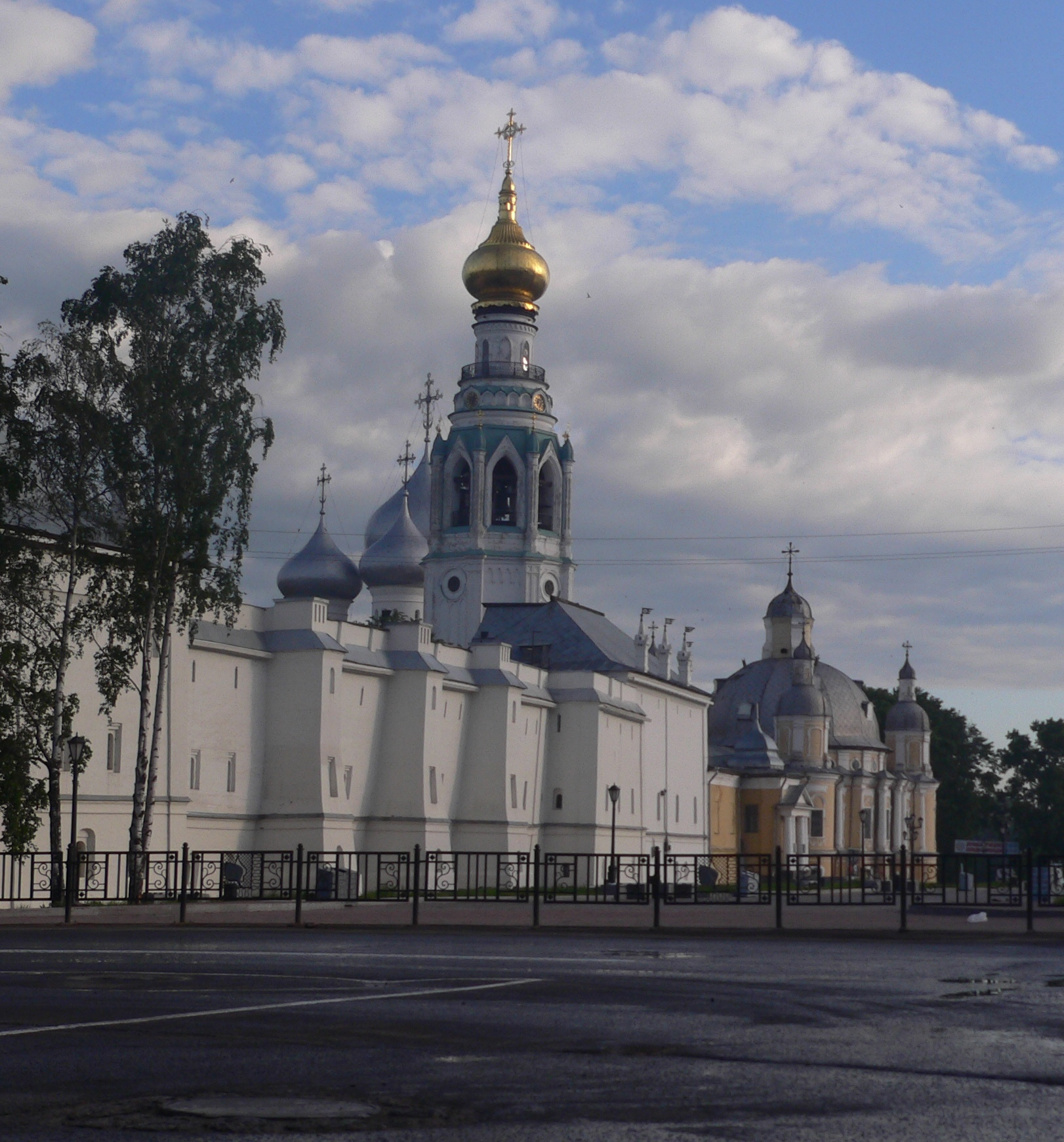 Стены Архиерейского двора и Воскресенский собор. Кремлевская площадь